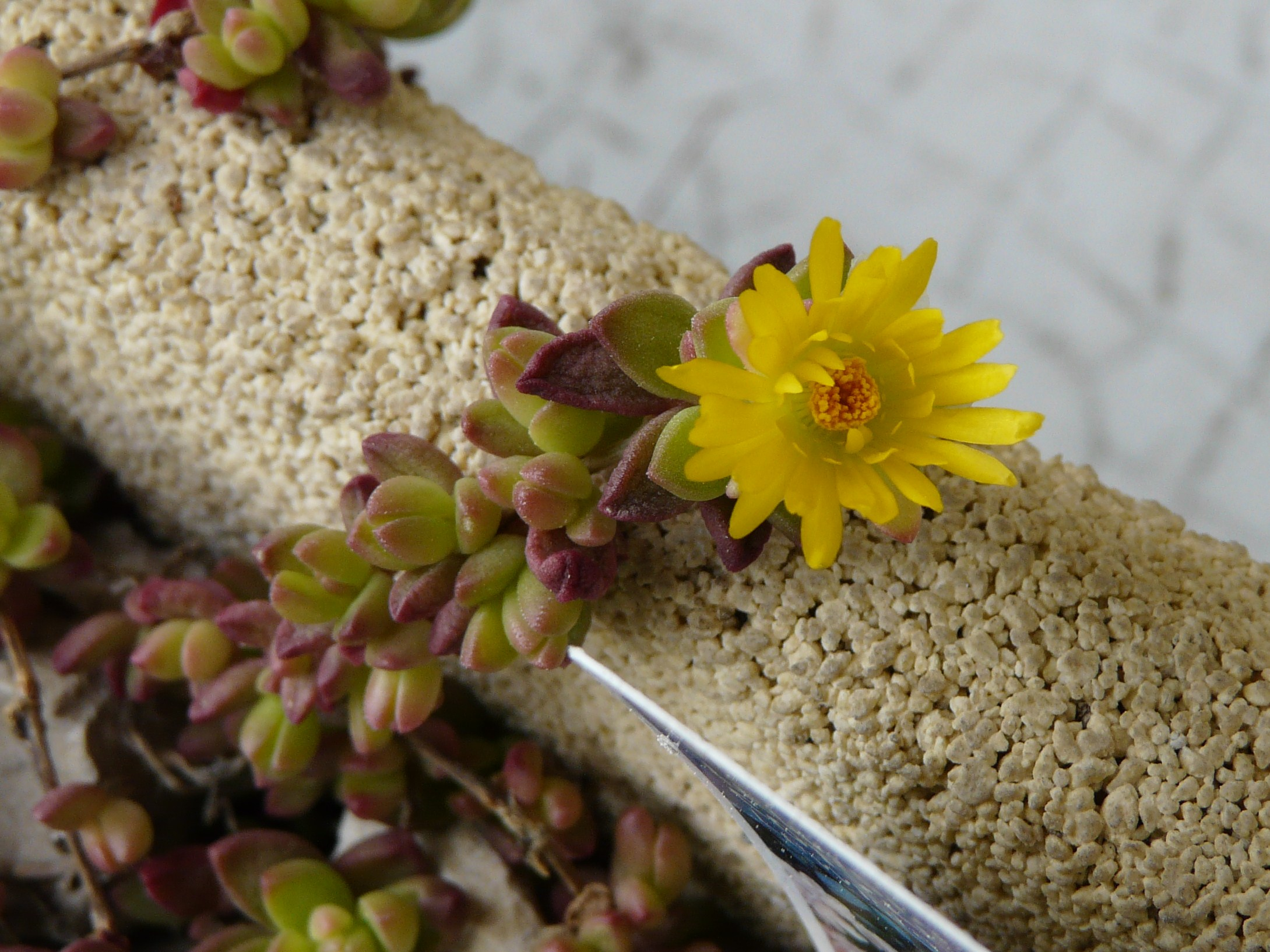 Fleur de Delosperma lineare, Dordogne, France.